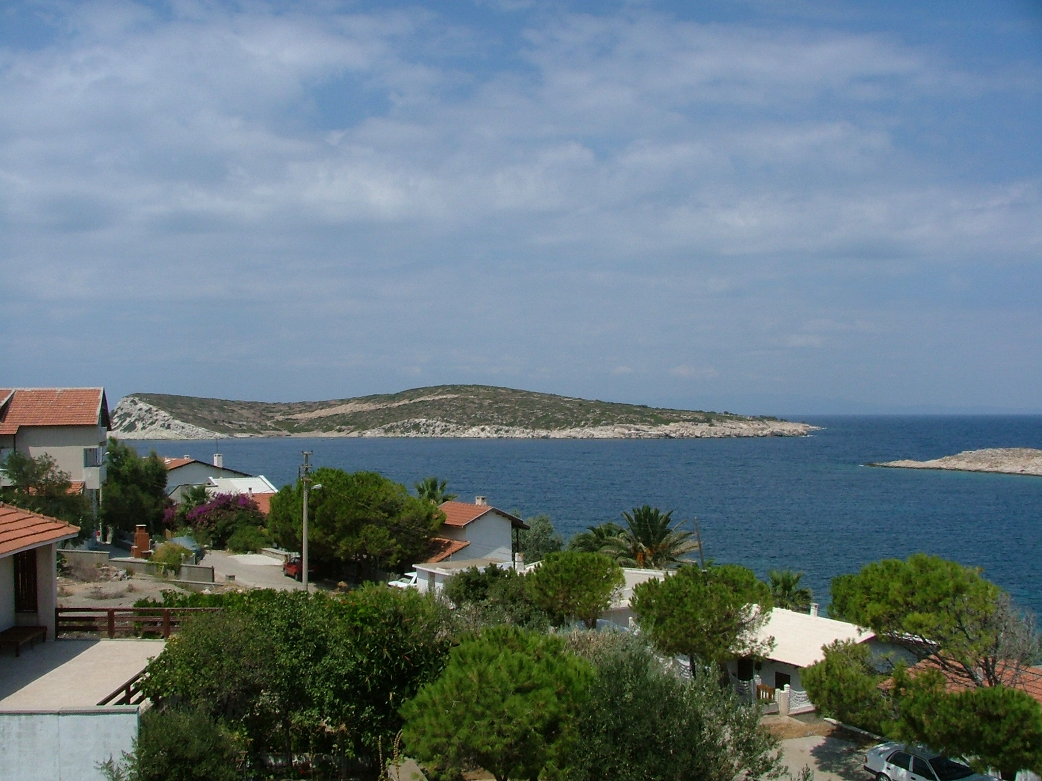 Kaynak: Kendi çektiğim foto. --Dbl2010